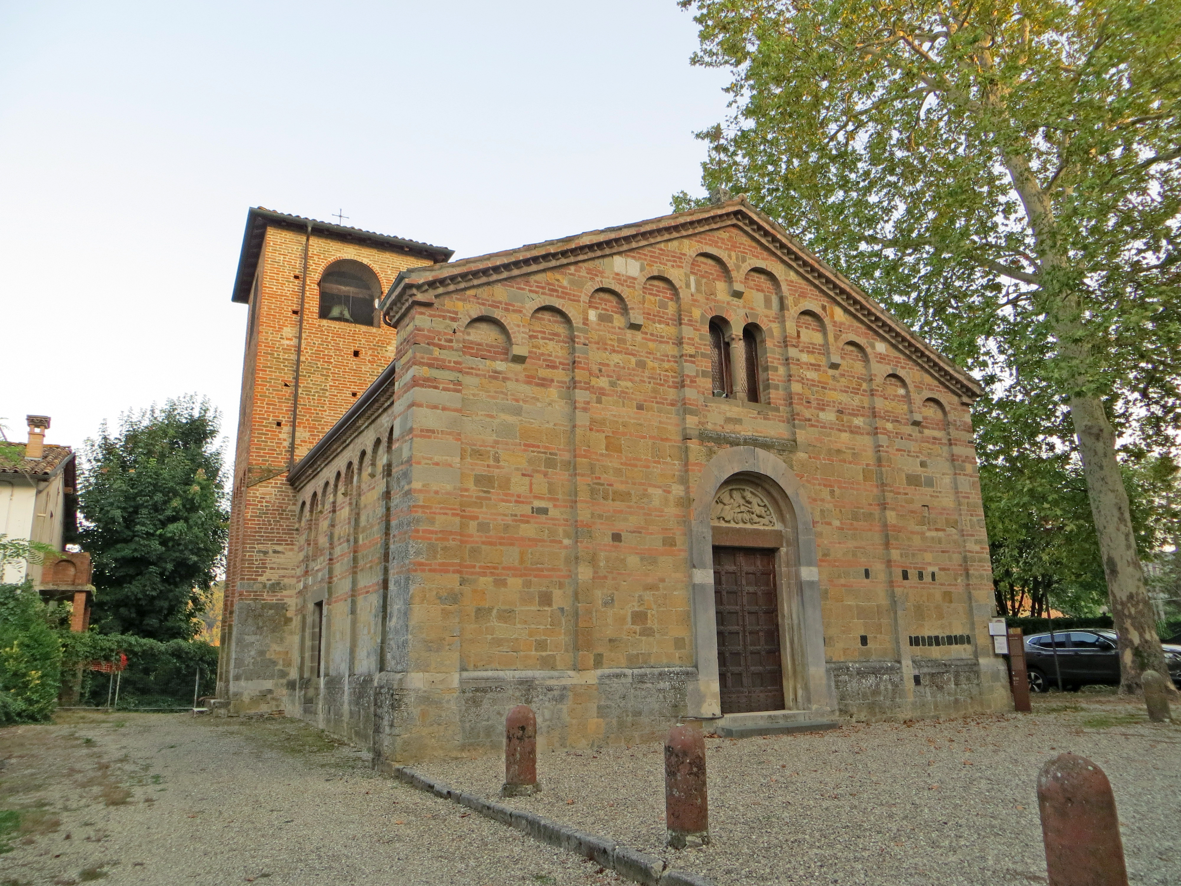 Facciata e lato nord della pieve di San Biagio This is a photo of a monument which is part of cultural heritage of Italy.